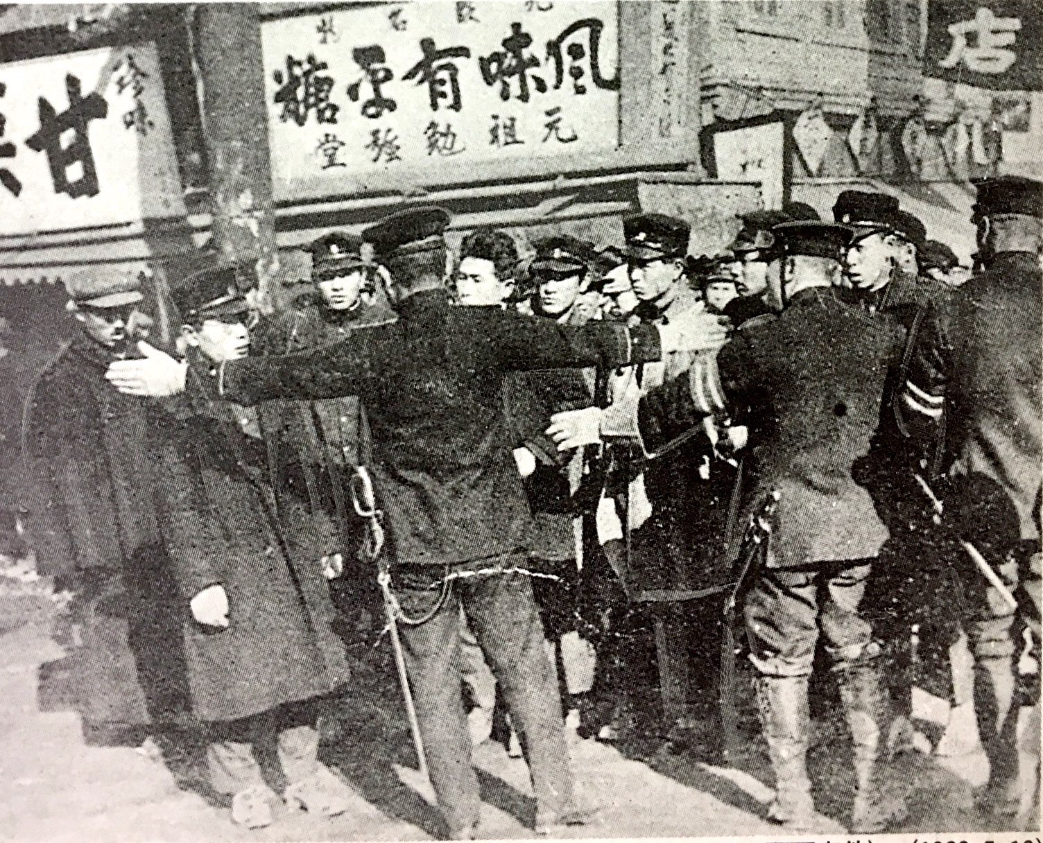 軍事教練に反対し警官とにらみ合うw:ja:早稲田大学学生（早大軍研事件）